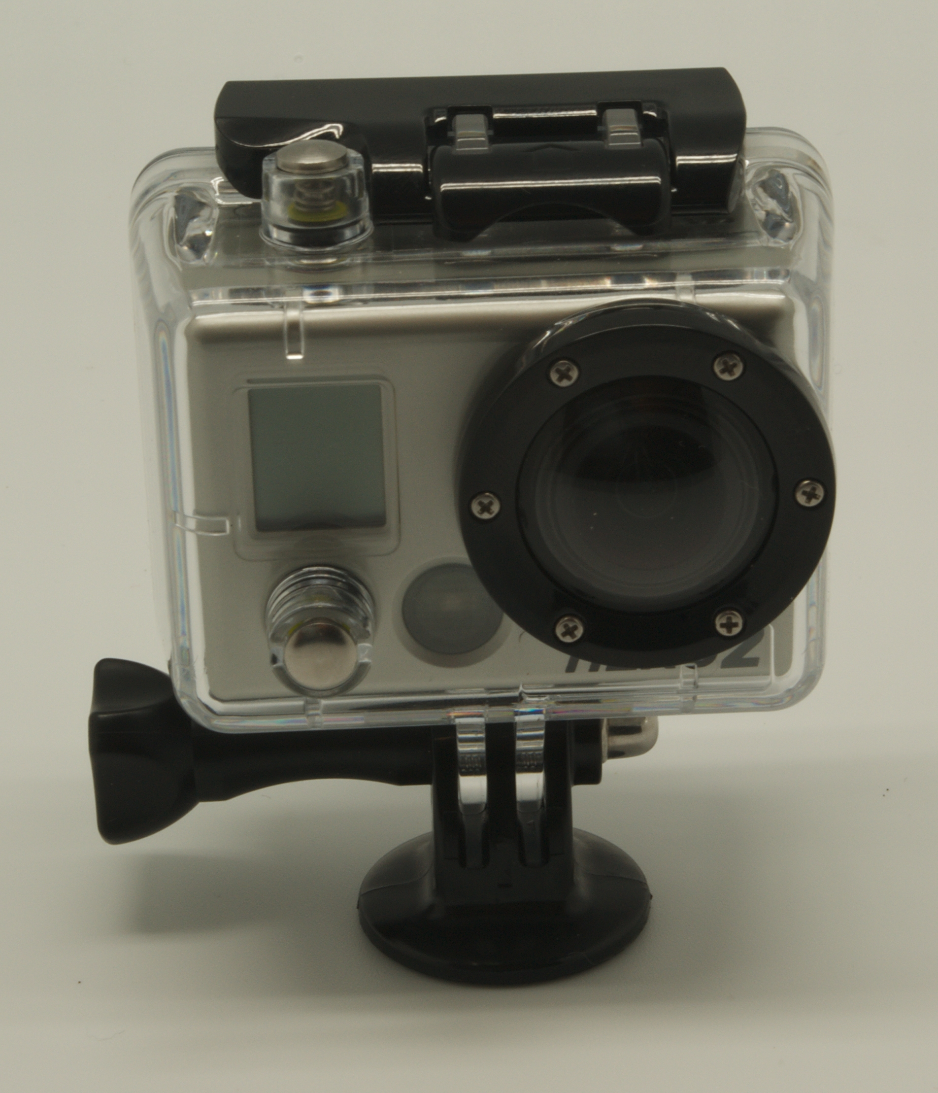 GoPro WMCH